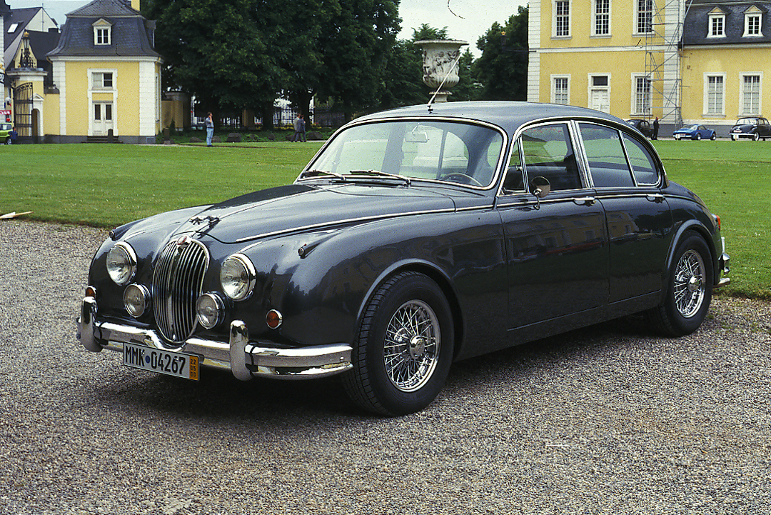 Jaguar Mark II, Baujahr 1963